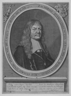 Zacharias (II.) Stenglin, * Augsburg 14. März 1604, † Frankfurt 18. Januar 1674. Diplomat, Jurist, J.U.D.; nach Studium und Reisen in Europa 1630 zunächst Konsulent des Augsburger Rats, 1632 Stadtadvokat in Augsburg; 1637 Stadtsyndikus in Frankfurt am Main, herzoglich württembergischer Rat, bis 1648 Gesandter in Münster und Osnabrück, 1663 Komitialgesandter in Regensburg; Sohn des Christoph Stenglin (* 1565, † nach 1635, der ein Sohn des Zacharias (I.) Stenglin, Handelsmann in Augsburg, war) und der Judith Pachmeyer; Ehemann der Anna Maria Oesterreicher-Welser (Tochter aus dieser Ehe: Maria Philippina Stenglin); Ehemann der Philippine Butz; Ehemann der Anna Margarethe Moritz